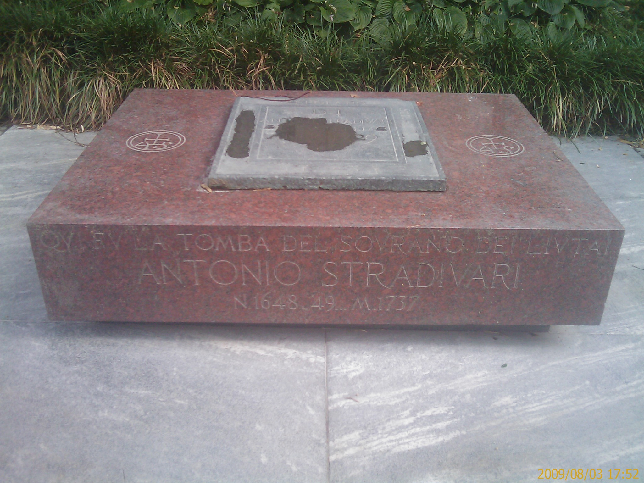 Qui fu la tomba del sovrano dei liutai Antonio Stradivari - Gedenkstein an Stradivari in Cremona Piazza Roma 2009